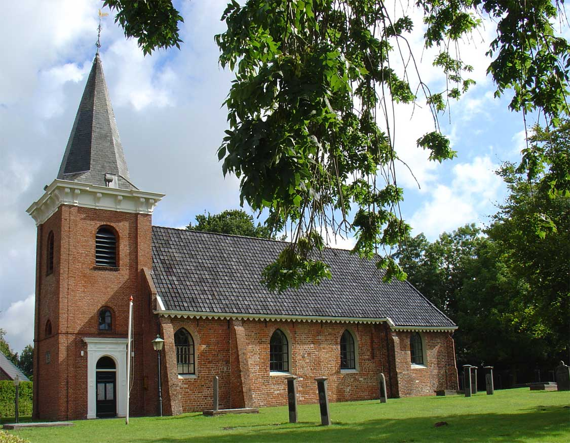 De kerk van Wedde